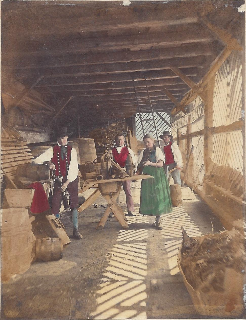 Ldudovico Wolfgang Hart, getintete Fotographie aus der Galerie universelle des Peuples N° 47: Gutacher Tracht, 1864. In der 1866 Ausgabe von La Foret noire wird die Aufnahme wiederverwendet und ist als Kirschwasserfabrik betitelt. 1867 waren in Gutach die Berennereien die von Abele und die von Götz ansässig